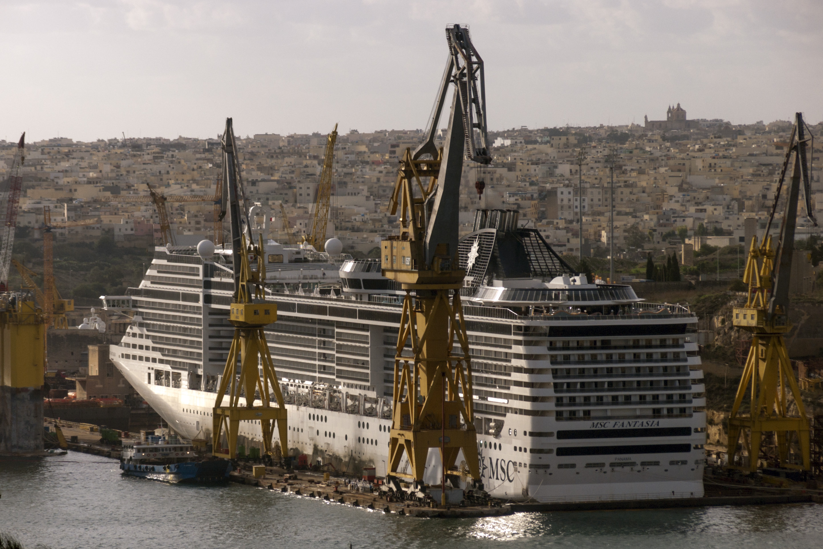 Круизный лайнер "MSC Fantasia" в доке.